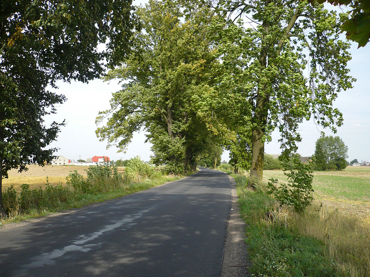 Droga nr 538 przebiegająca przez Jasiewo w kierunku Łasina.